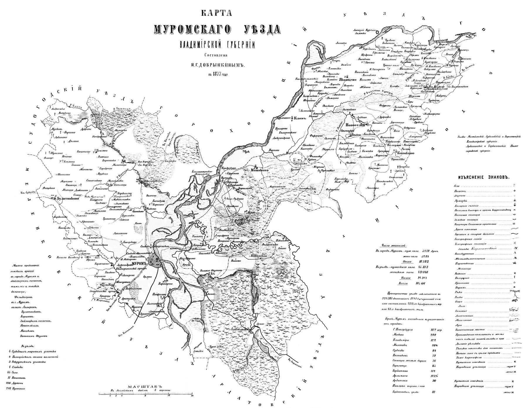 Карта Муромского Уезда Владимирской Губернии